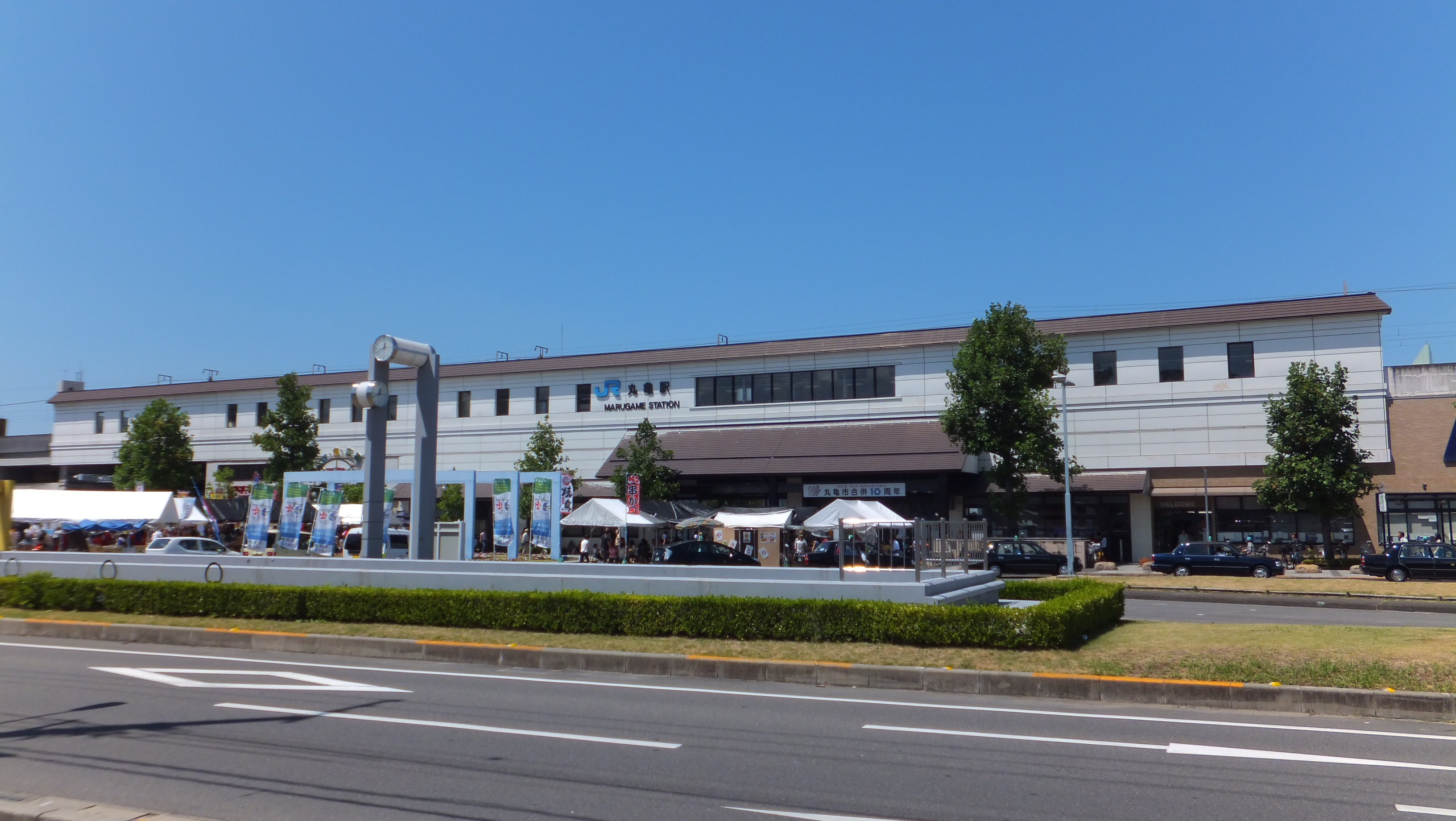 香川県丸亀市 丸亀駅 2015年8月 まるがめ婆娑羅まつり開催中